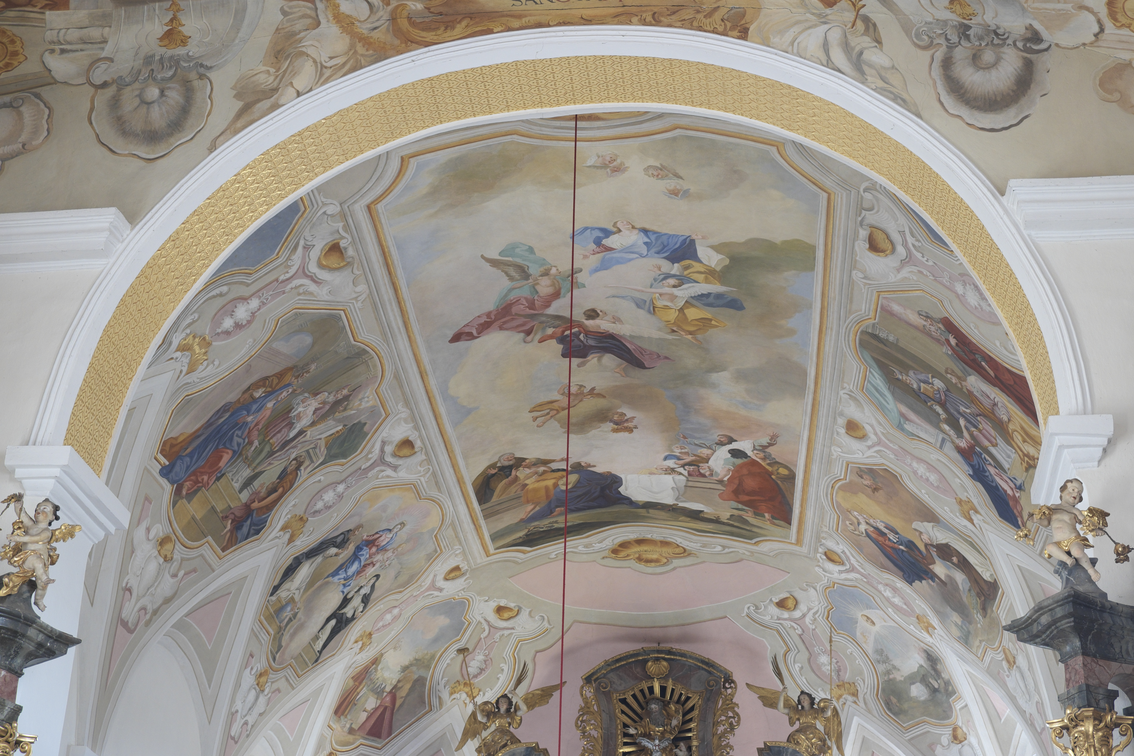 Katholische Pfarrkirche Mariä Heimsuchung in Gosseltshausen (Wolnzach) im Landkreis Pfaffenhofen an der Ilm (Bayern/Deutschland), Deckenfresken im Chor von Melchior Buchner (Puchner, Büchner), von 1752; Darstellung: Mariä Himmelfahrt